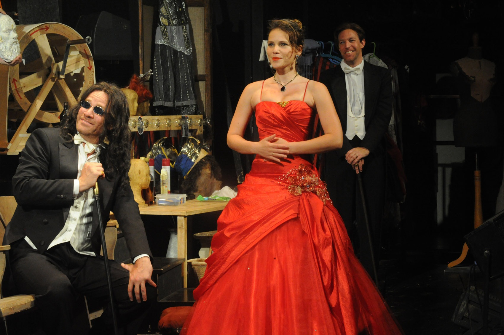 דנה מיינרט בהצגה פרימה דונה, תיאטרון גשר